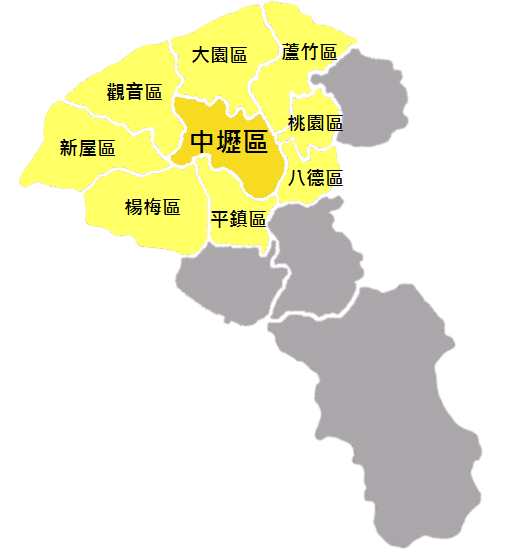 中壢區位置圖